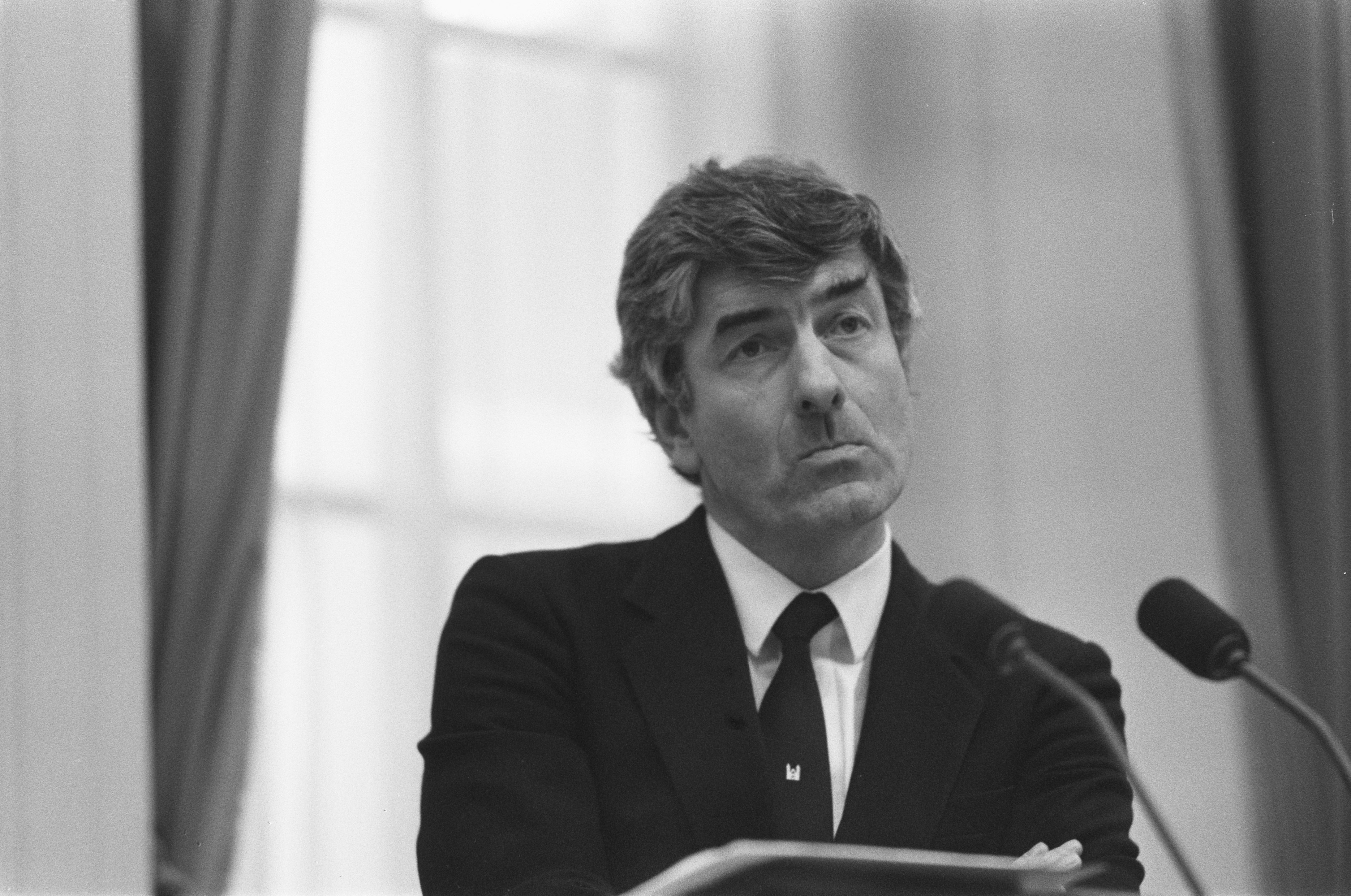 Collectie / Archief : Fotocollectie Anefo Reportage / Serie : [ onbekend ] Beschrijving : Tweede Kamer , bezuinigingsdebat; premier Lubbers Datum : 29 maart 1988 Trefwoorden : debatten Persoonsnaam : Lubbers, Ruud Fotograaf : Bogaerts, Rob / Anefo Auteursrechthebbende : Nationaal Archief Materiaalsoort : Negatief (zwart/wit) Nummer archiefinventaris : bekijk toegang 2.24.01.05 Bestanddeelnummer : 934-2209